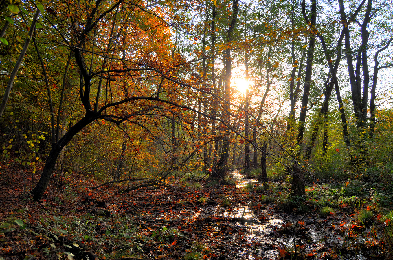 Torbiere del Bassone di Albate This is a photo of a monument which is part of cultural heritage of Italy.